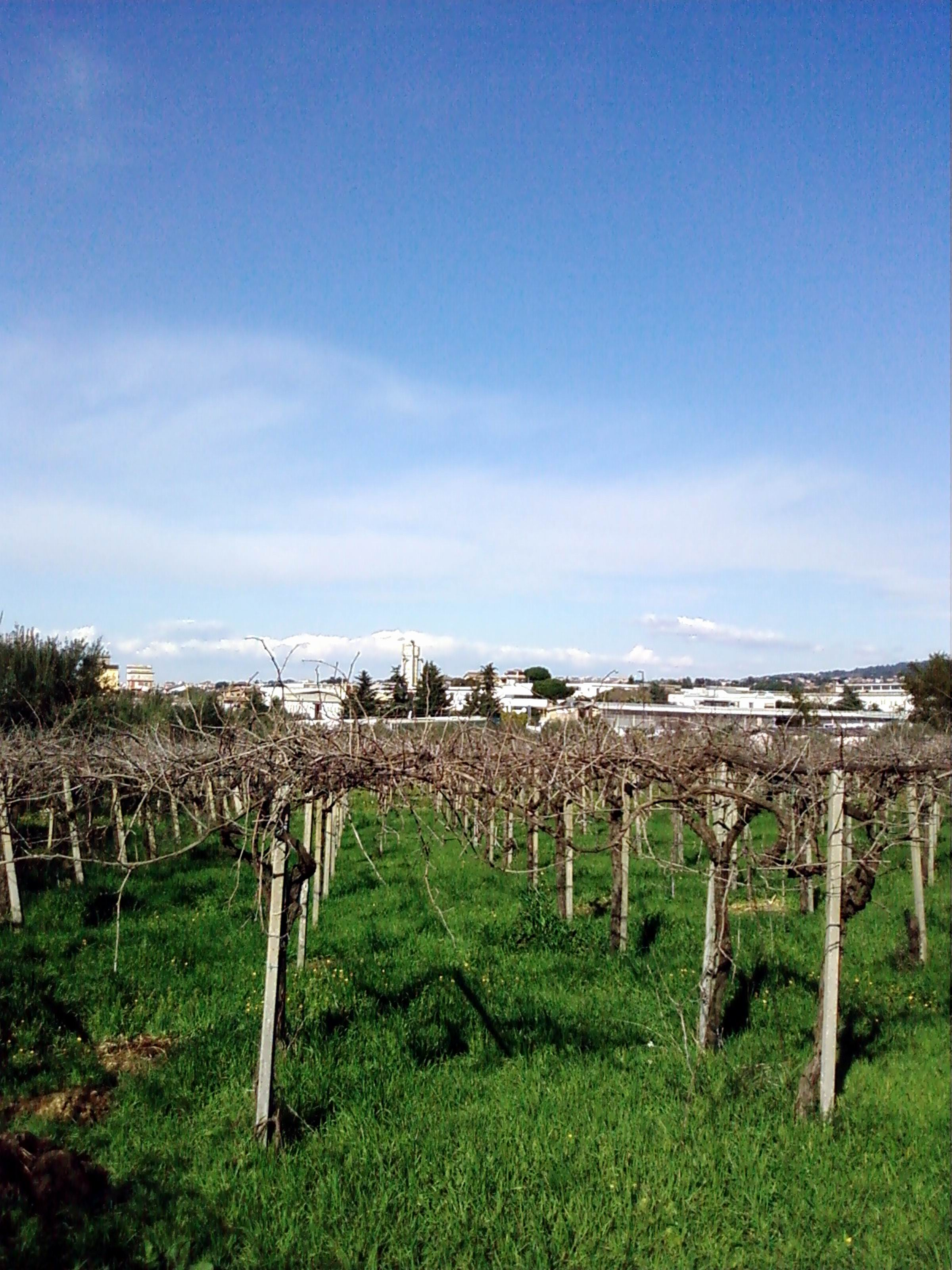 Albano laziale, la zona industriale di Cancelliera